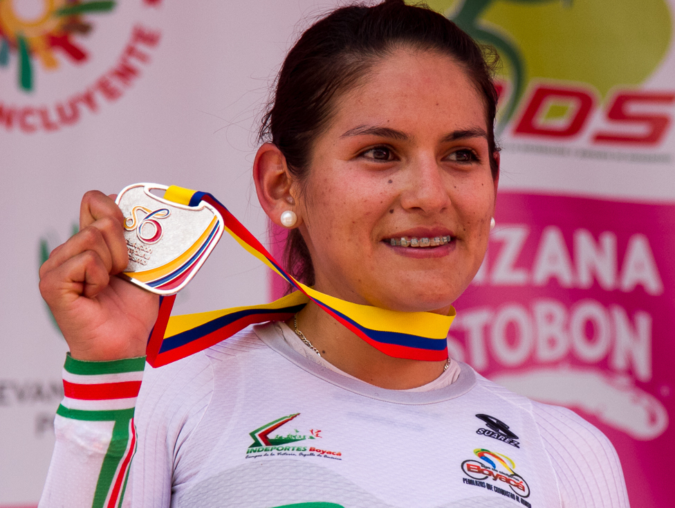 Serika Gulumá en el podio - - CRI Damas Campeonatos Nacionales de Ruta Boyacá 2016